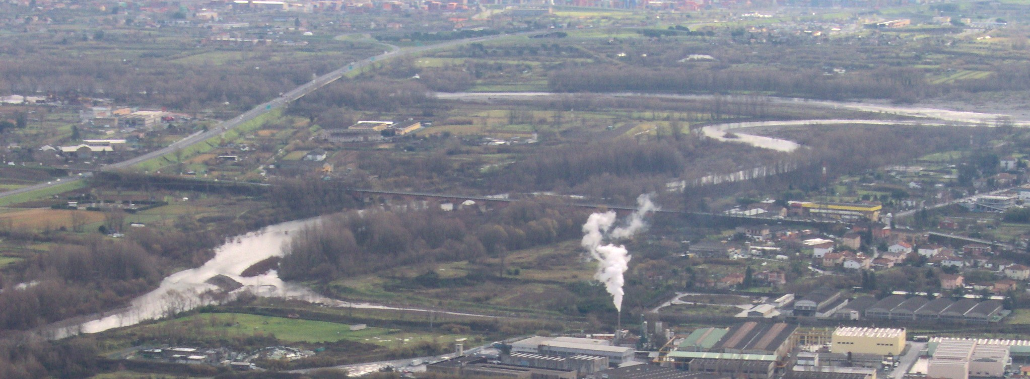 Fiume Vara fotografato da Follo Castello